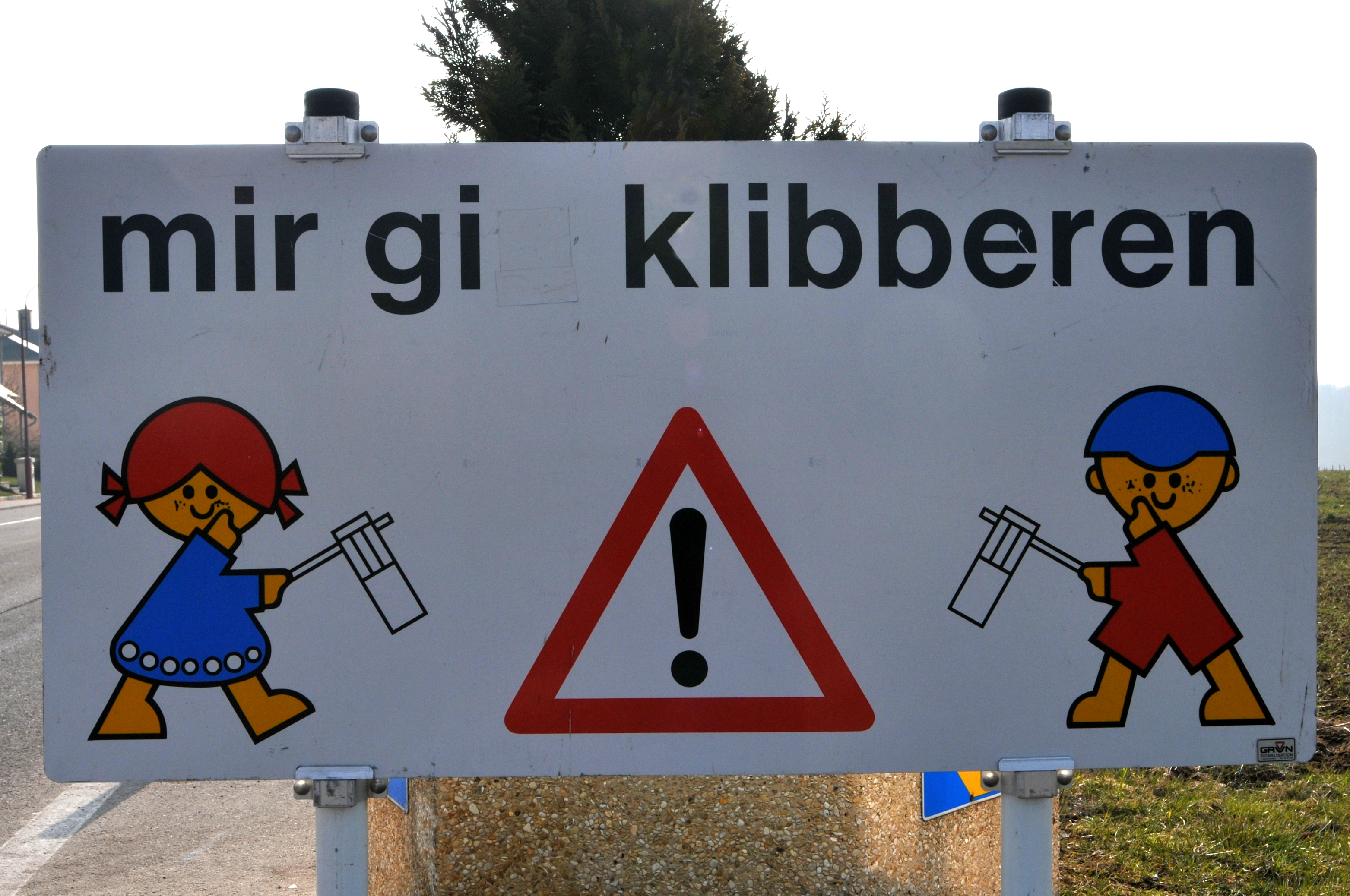 D'Joer drop war de Feeler verbessert.